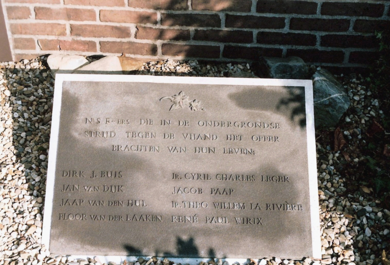 Herdenkingsplaquette voor gevallen NSF-er, zoals geplaats op het terrein van het in 1998 gesloopte fabriekscomplex te Hilversum. In de nacht van dinsdag 31 augustus 2011 werd deze plaquette gestolen vanaf haar nieuwe plek, de begraafplaats Gedenk te sterven te Hilversum.